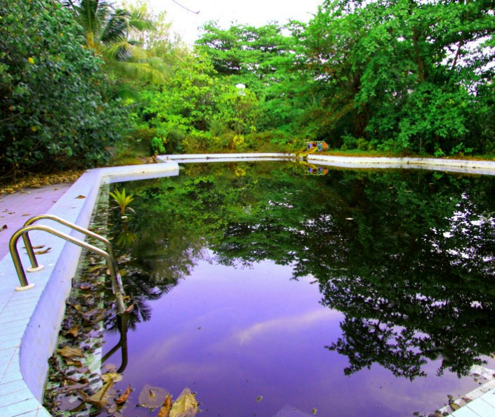 suasana kolam renang yang terabaikan